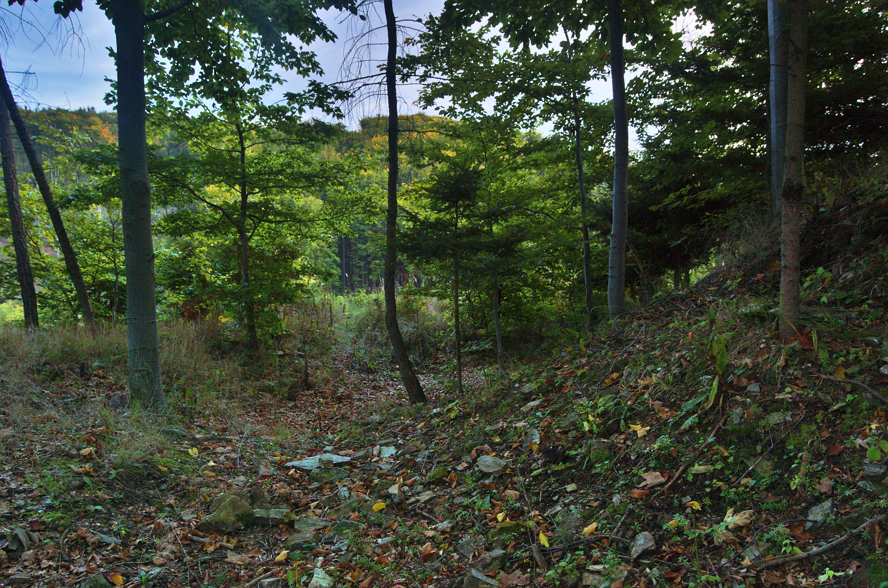 Pozůstatky valu zříceniny hradu Plankenberk, Zálesí, Biskupice, okres Svitavy